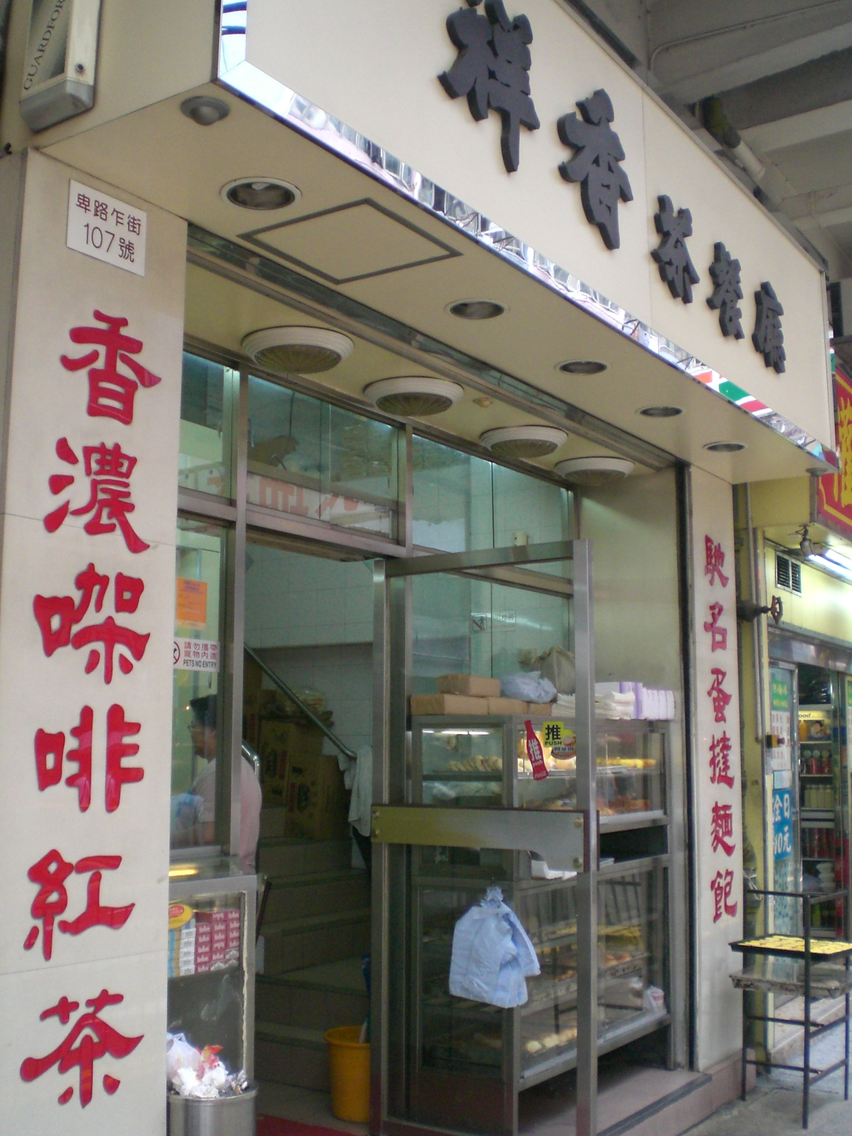 位於zh:卑路乍街107號的香港式蛋撻店及茶餐廳, Cha chaan teng.